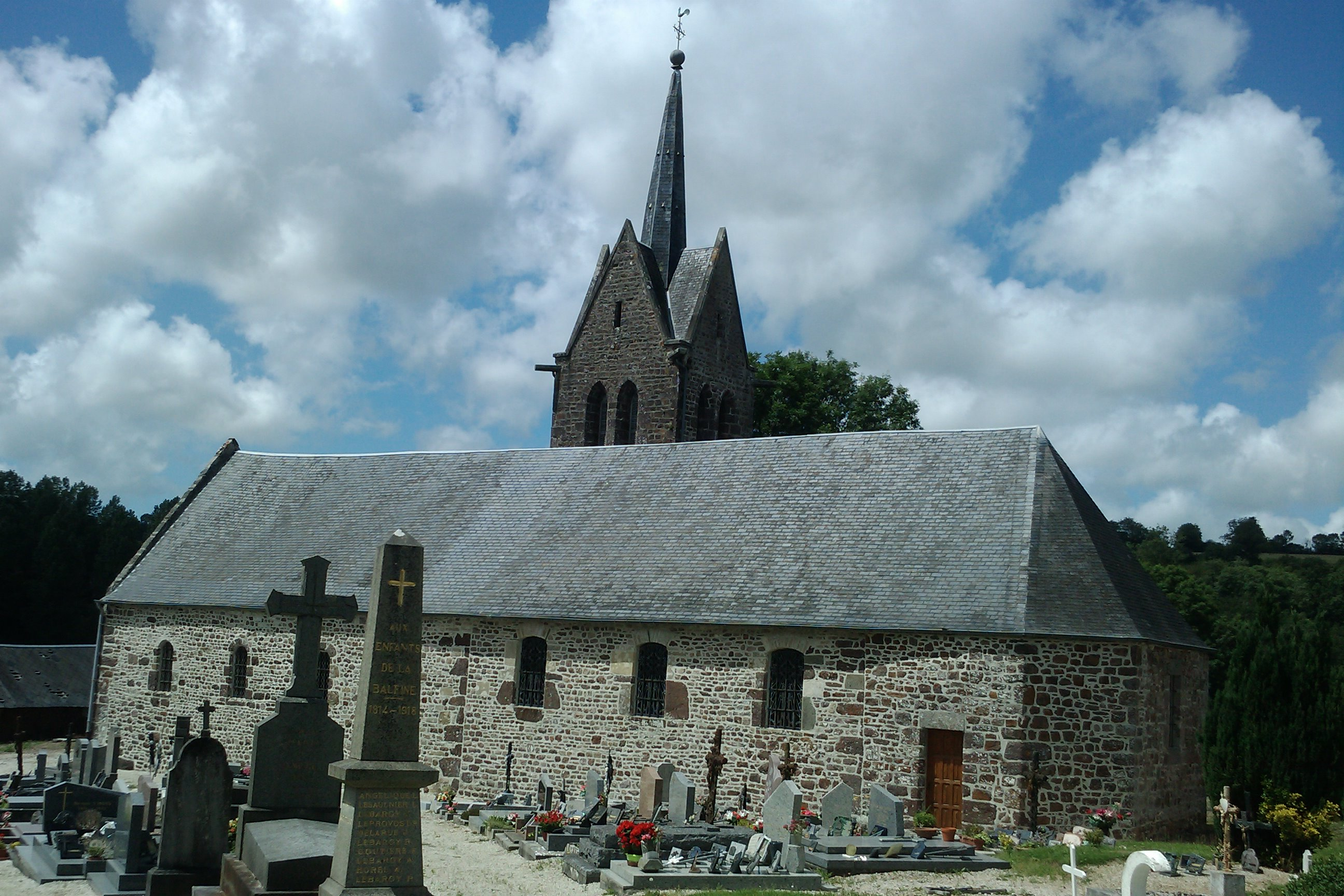 église Saint-Pierre de La Baleine